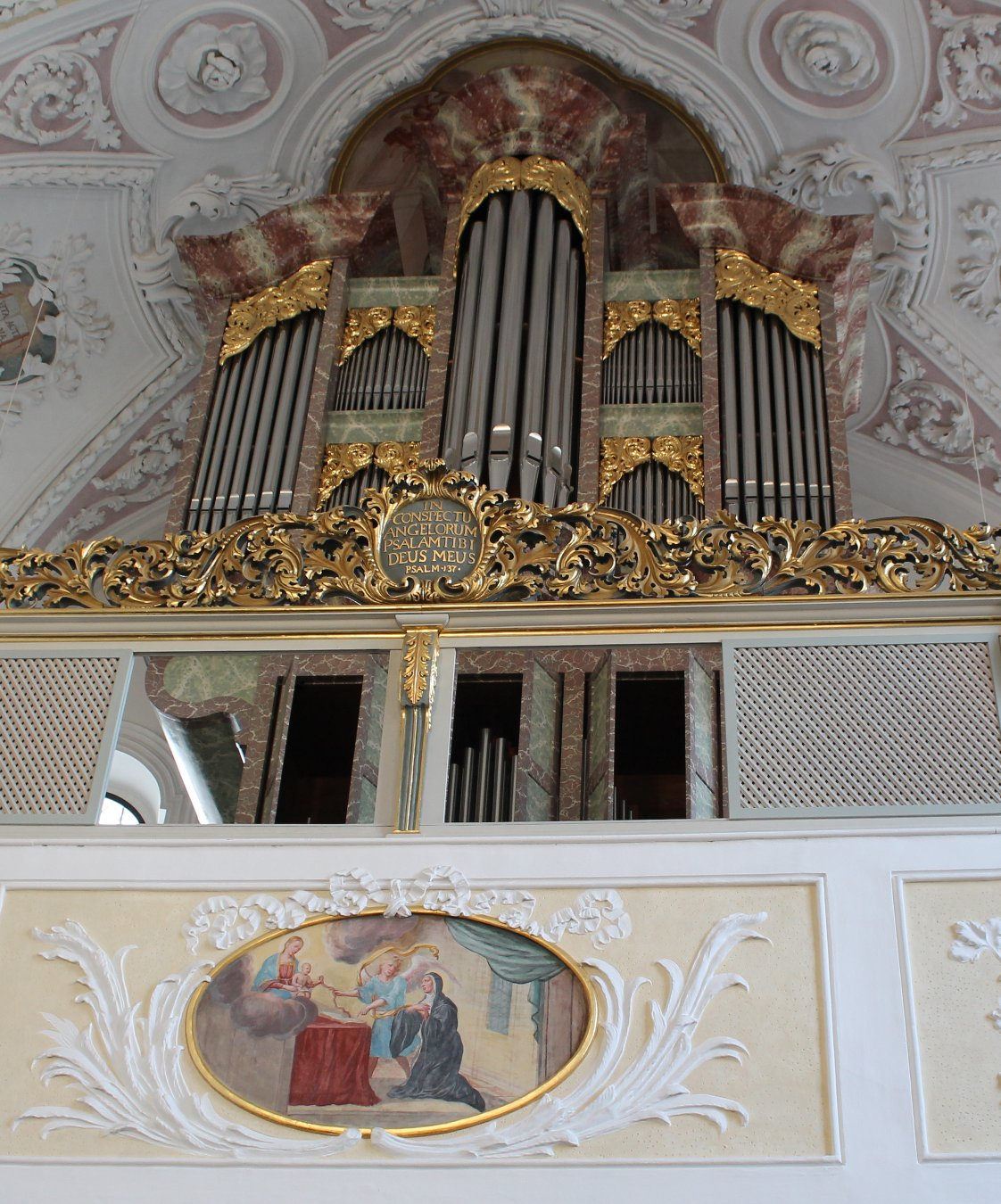 Orgel von St. Ursula in Neuburg an der Donau (1985, Klais, III/40)